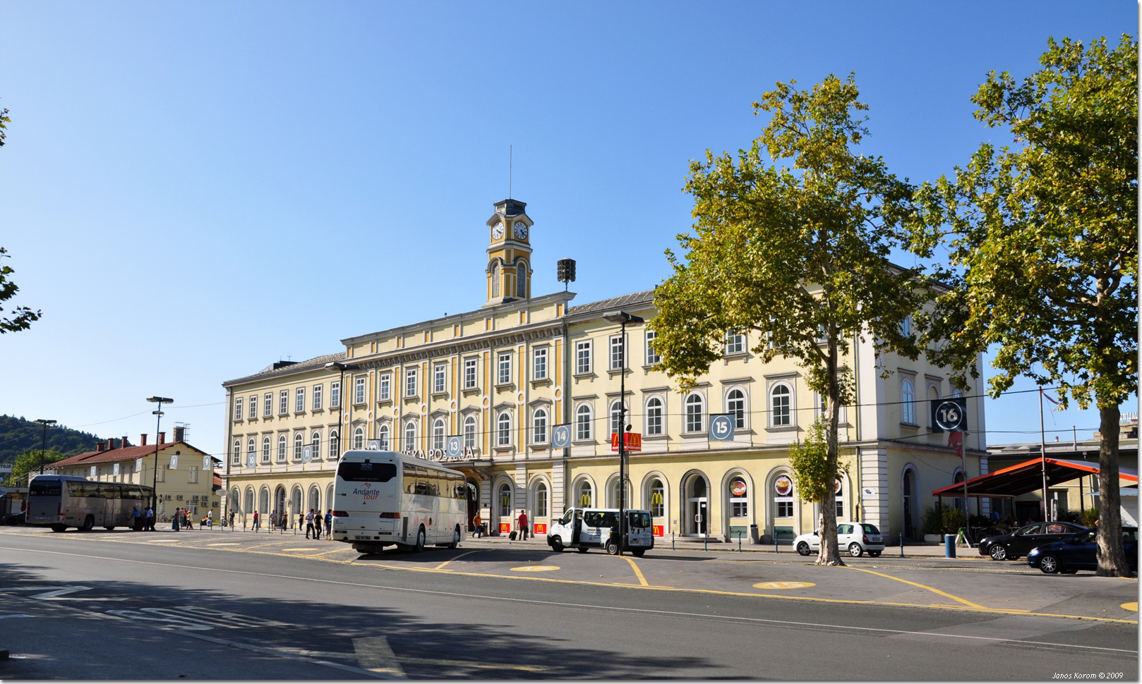 Ljubljana (294)